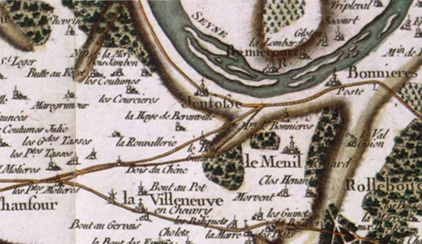 Extrait de la carte de Cassini sur Jeufosse (Yvelines - France) - 1747-1790.